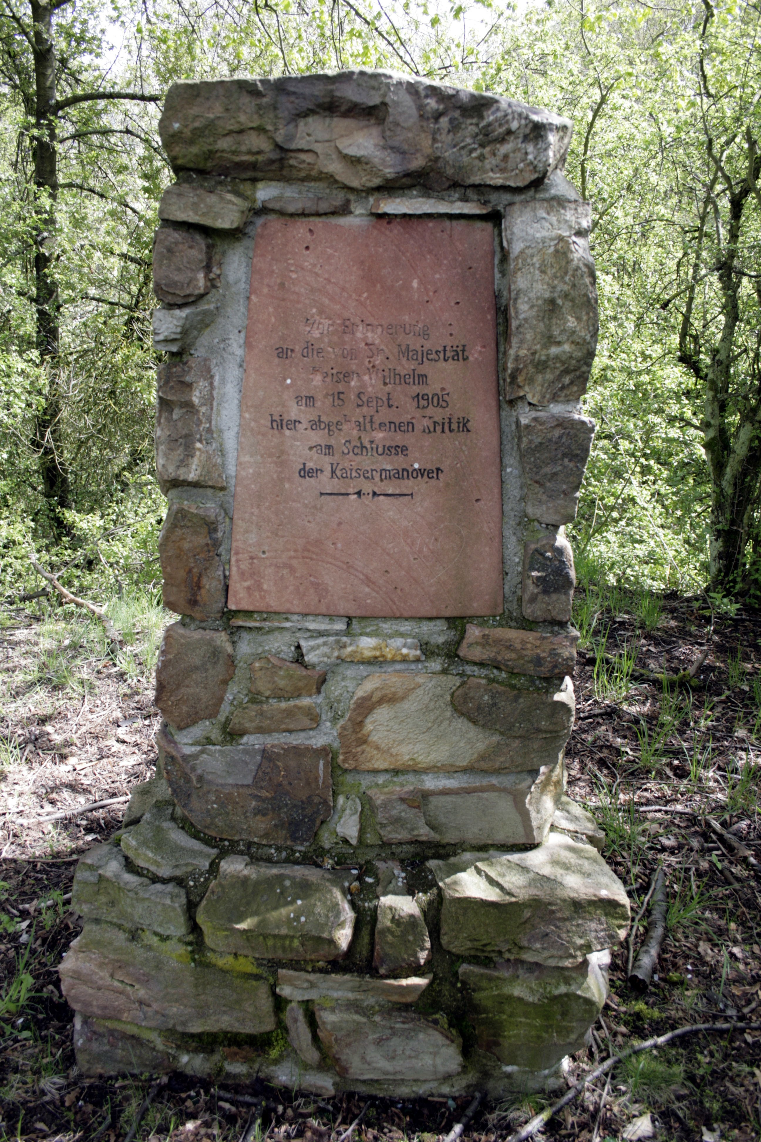 Kaisermanöver-Denkmal auf dem Nauheimer Kopf, Hünfelden-Nauheim, Deutschland